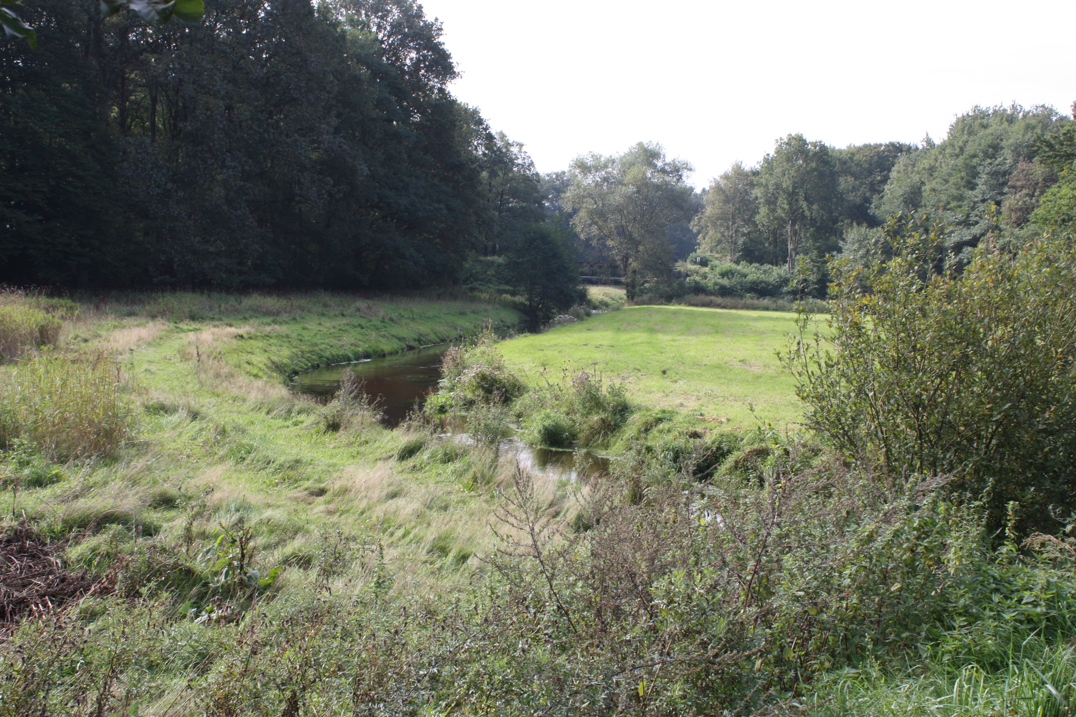 Zeven